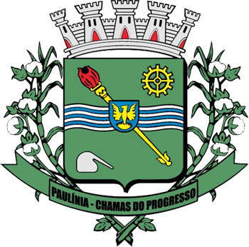 Brasão de Paulinia, Brasil.